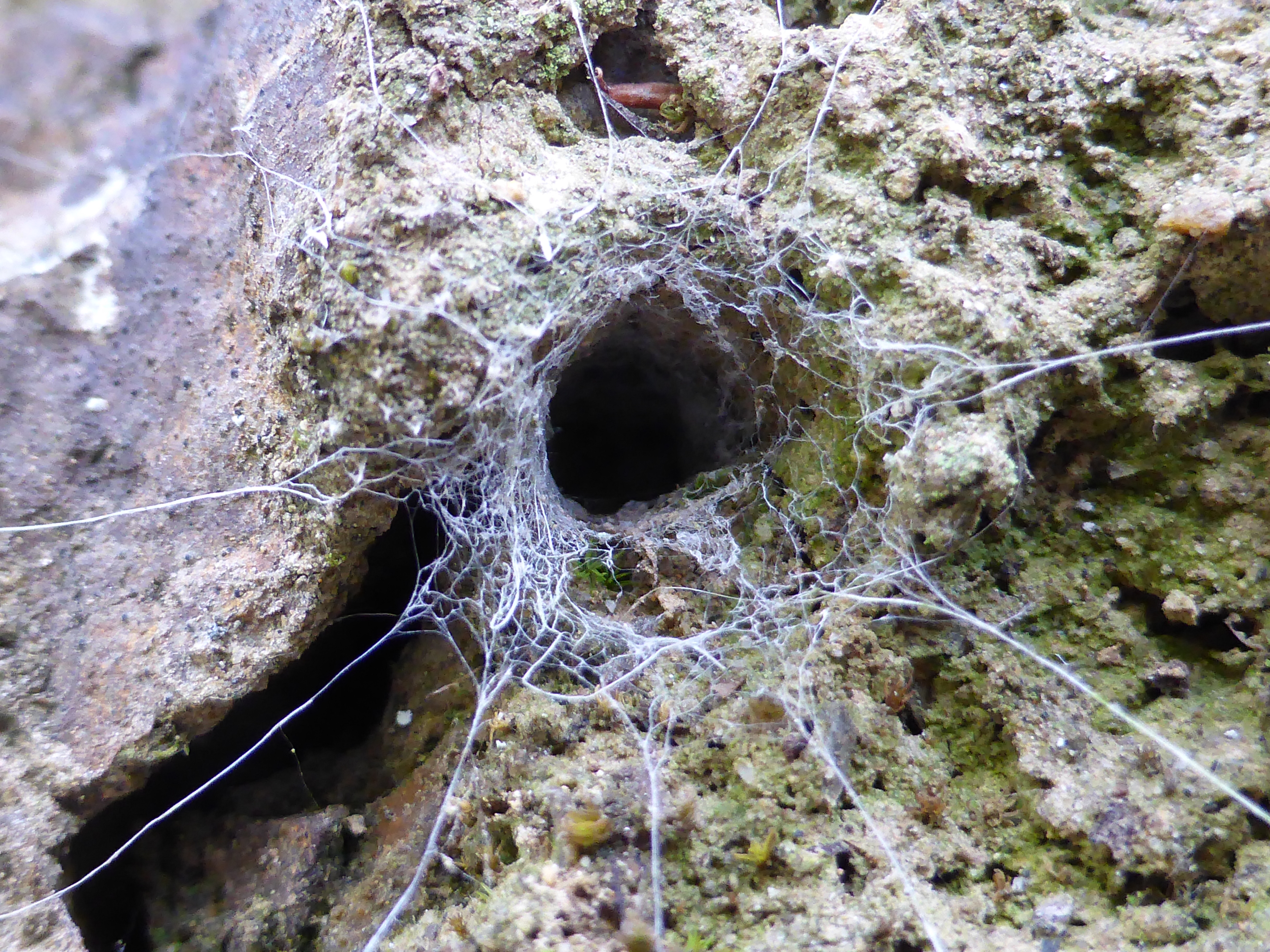 Toile de Segestria senoculata, Pyrénées-Orientales